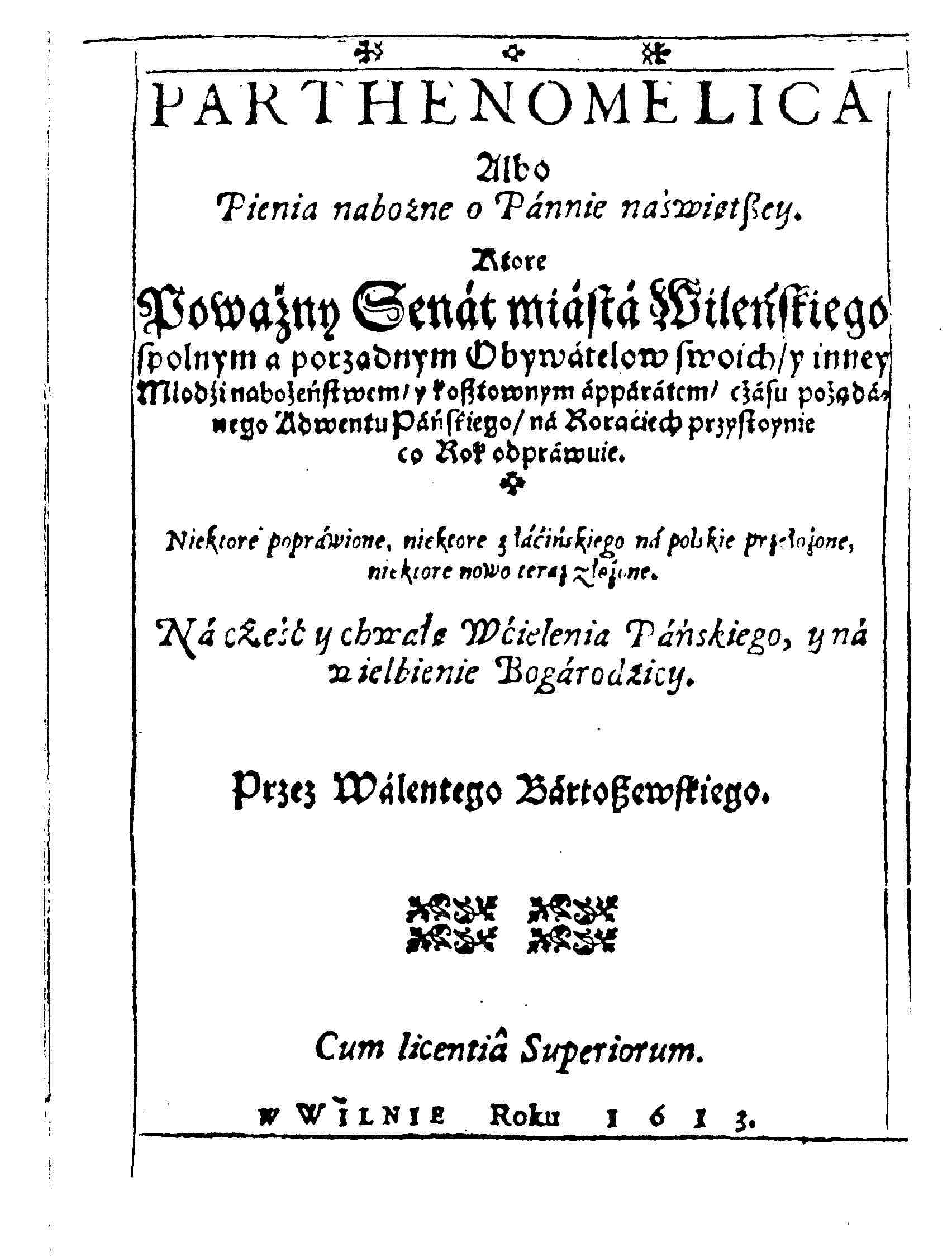 Валенты Барташэўскі. Партэнамеліка («Parthenomelica»)